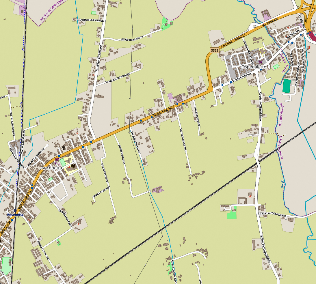 Anconetta e Ospedaletto